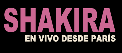 Logo basado en la tipografía original del DVD Shakira En vivo desde París